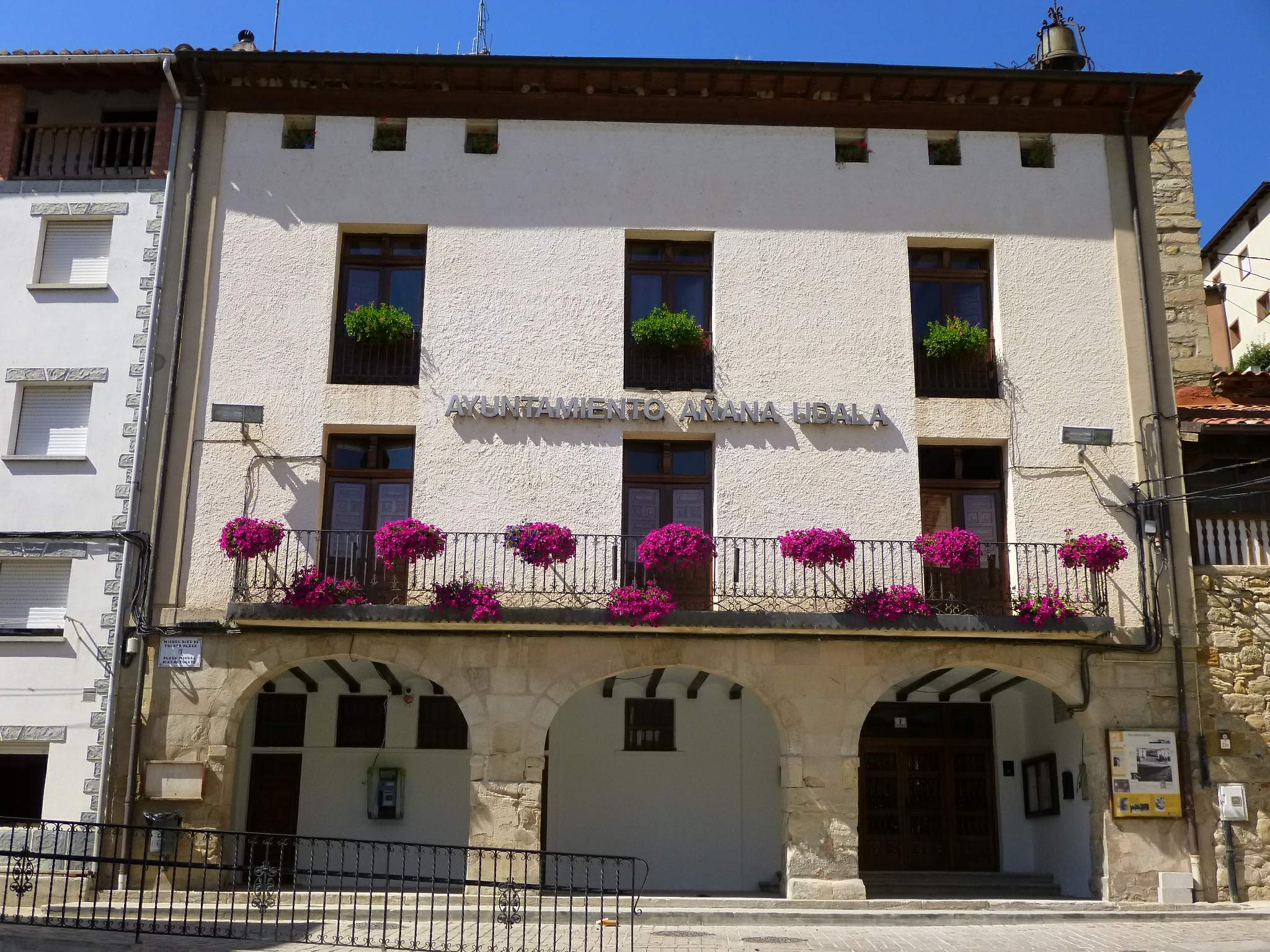 Ayuntamiento de Añana (Salinas de Añana, Álava)